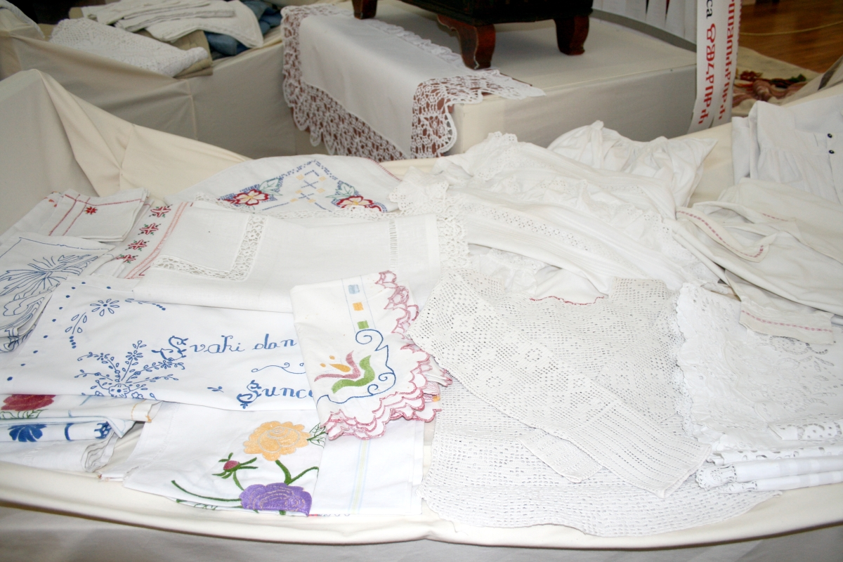 snimljeno tijekom Noći muzeja u Etnografskom muzeju u Zagrebu